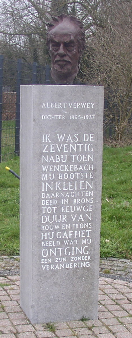 Albert Verwey, bronsportret op stenen zuil met inscriptie.